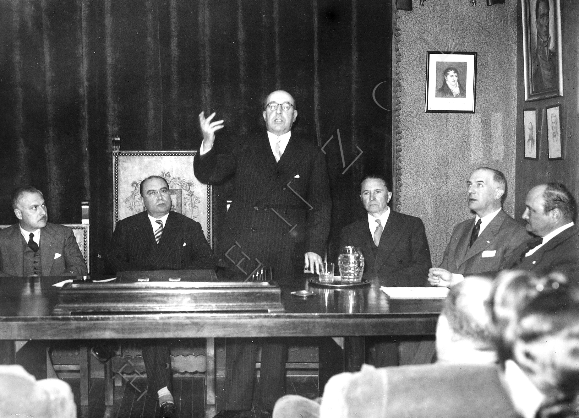 Conferencia de Ramón Otero Pedrayo no salón de Estudios Históricos de Mendoza (Argentina) 1947, con Manuel Cacheiro Rey e outros.